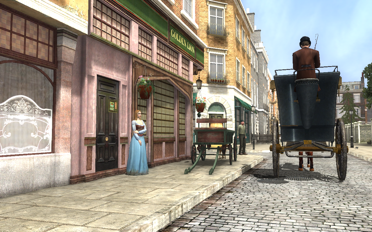 Capture d'écran du jeu Sherlock Holmes contre Arsène Lupin. Capture prise dans Melcombe Street, dans l'intro du jeu.